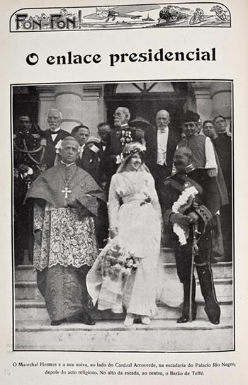 O marechal Hermes e Nair, ao lado do cardeal Arcoverde, na escadaria do Palácio Rio Negro, em Petrópolis, depois do casamento religioso.